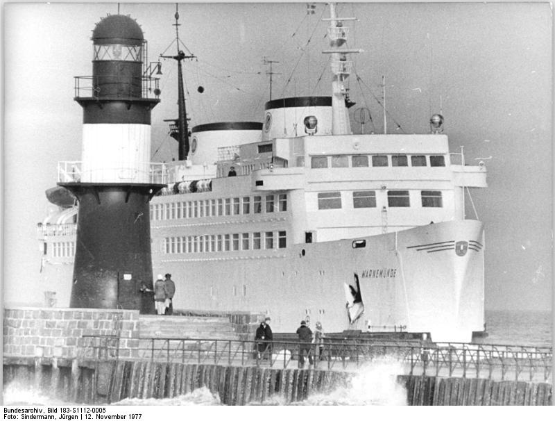 Warnemünde, Leuchtturm, Fährschiff ADN-ZB Sindermann 12.11.77 Rostock: Ein imposantes Bild bietet sich den Urlaubern und Touristen an der Mole in Warnemünde, wenn das DDR-Fährschiff "Warnemünde", aus Gedser kommend, in den Heimathafen einläuft.